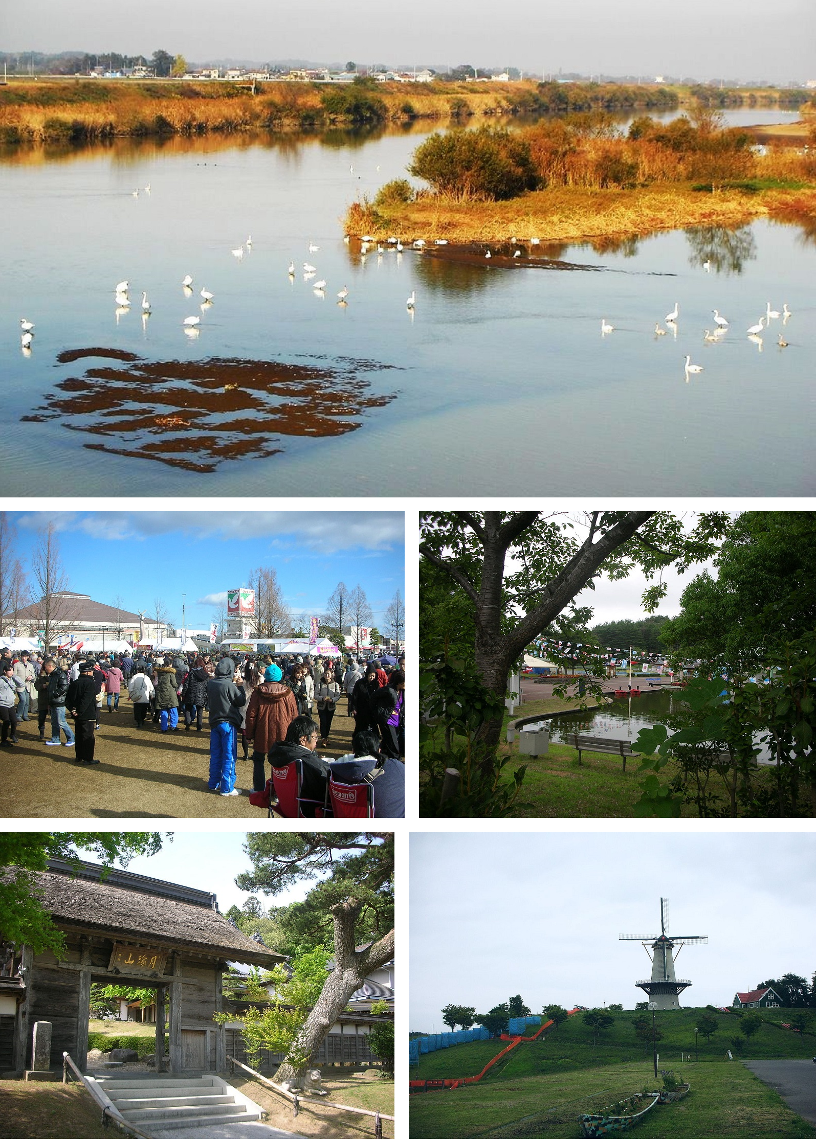 迫川・はっとフェスティバル・チャチャワールド・香林寺・長沼フートピア